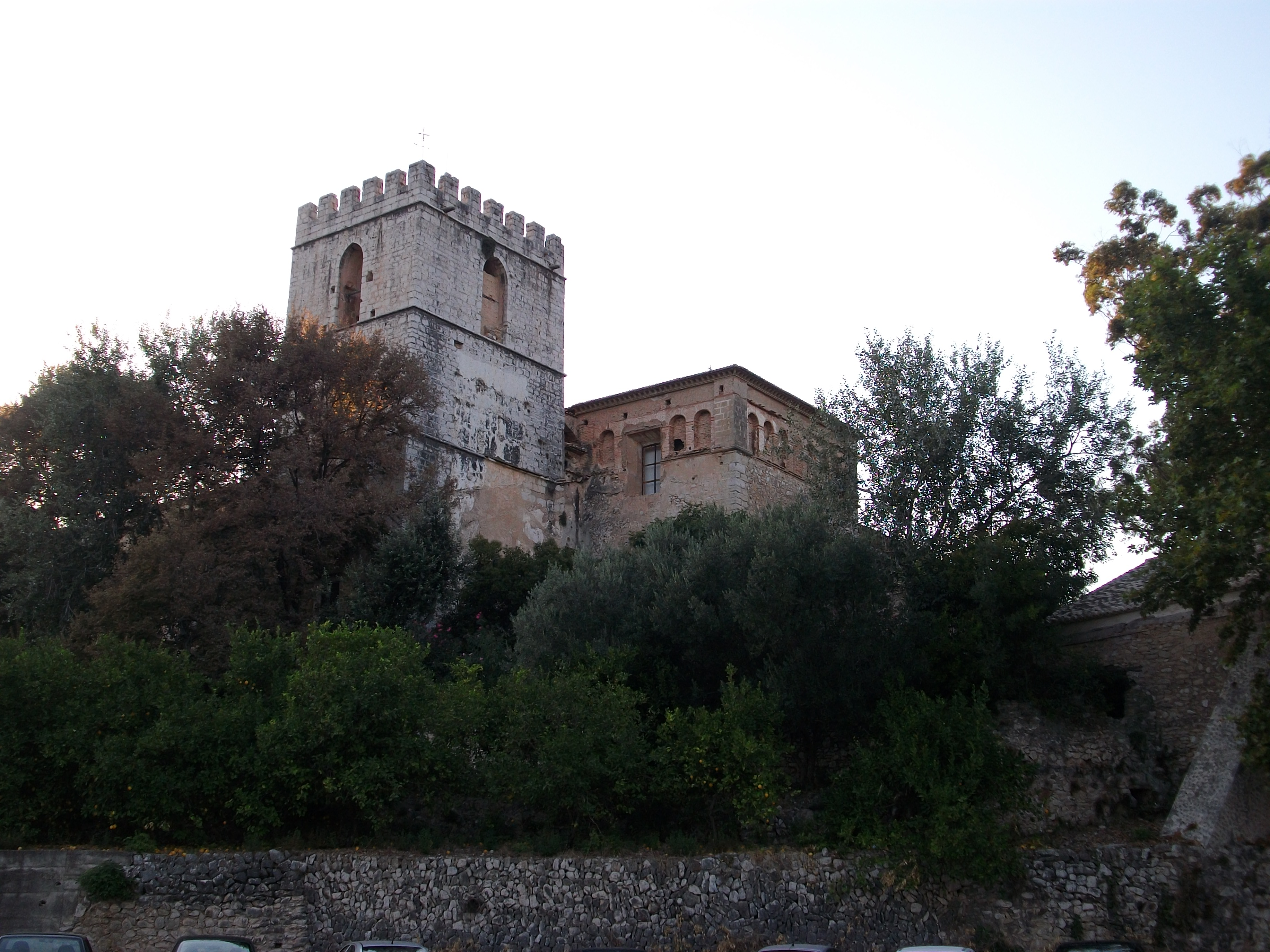 Torre de campanes i defensiva del monestir de Sant Jeroni de Cotalba.